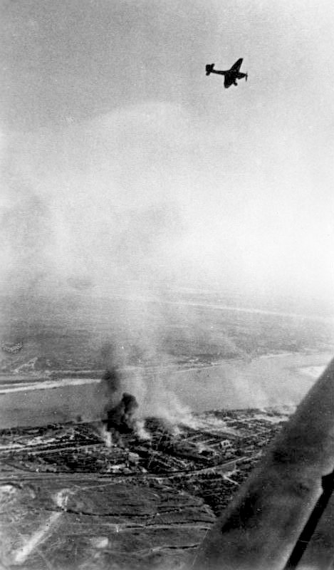 Russland, Kampf um Stalingrad, Luftangriff An der Sowjetfront: Kampf um Stalingrad.- Unaufhörlich überfliegen deutsche Sturzkampfflugzeuge Stalingrad und werfen im Sturzflug ihre Bomben auf kriegswichtige Ziele. PK-Aufnahme: Kriegsberichter Klose (Sch) 5670-42 "Fr.Fr.OKW" September 1942 [Herausgabedatum] [Sowjetunion.- Schlacht um Stalingrad.- Luftangriff mit Flugzeug Junkers Ju 87 "Stuka"]